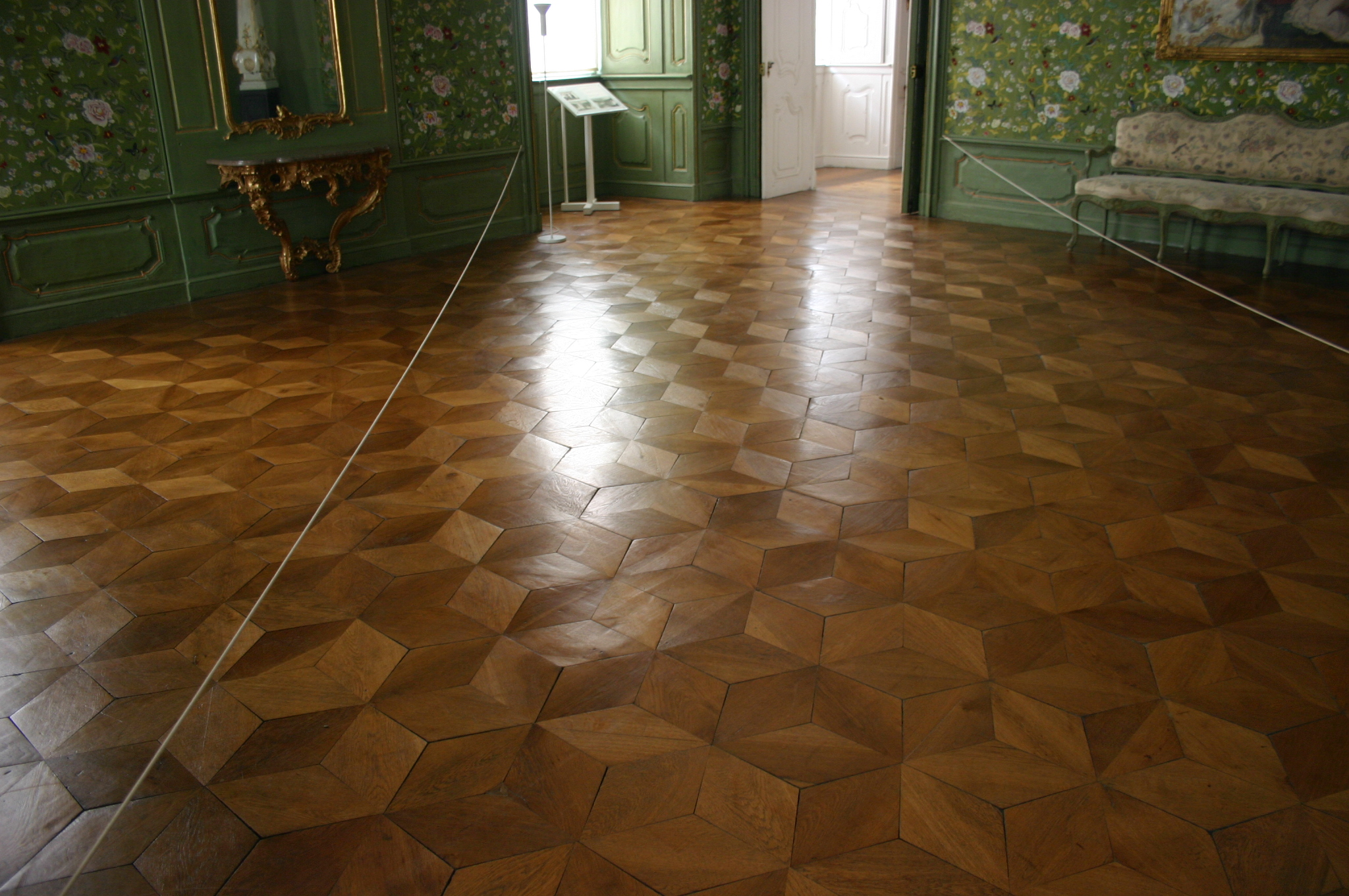 Fußboden im Audienzzimmer, Schloss Seehof.